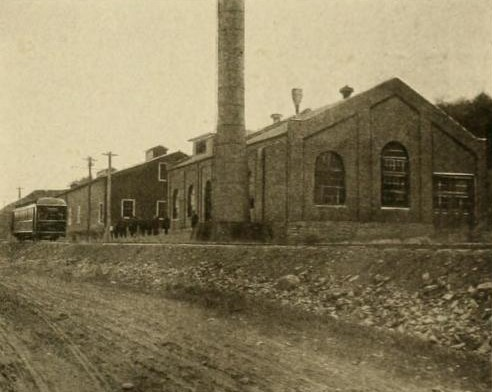 Elmira and Seneca Lake Railway - Außenansicht des Elektrizitätswerks